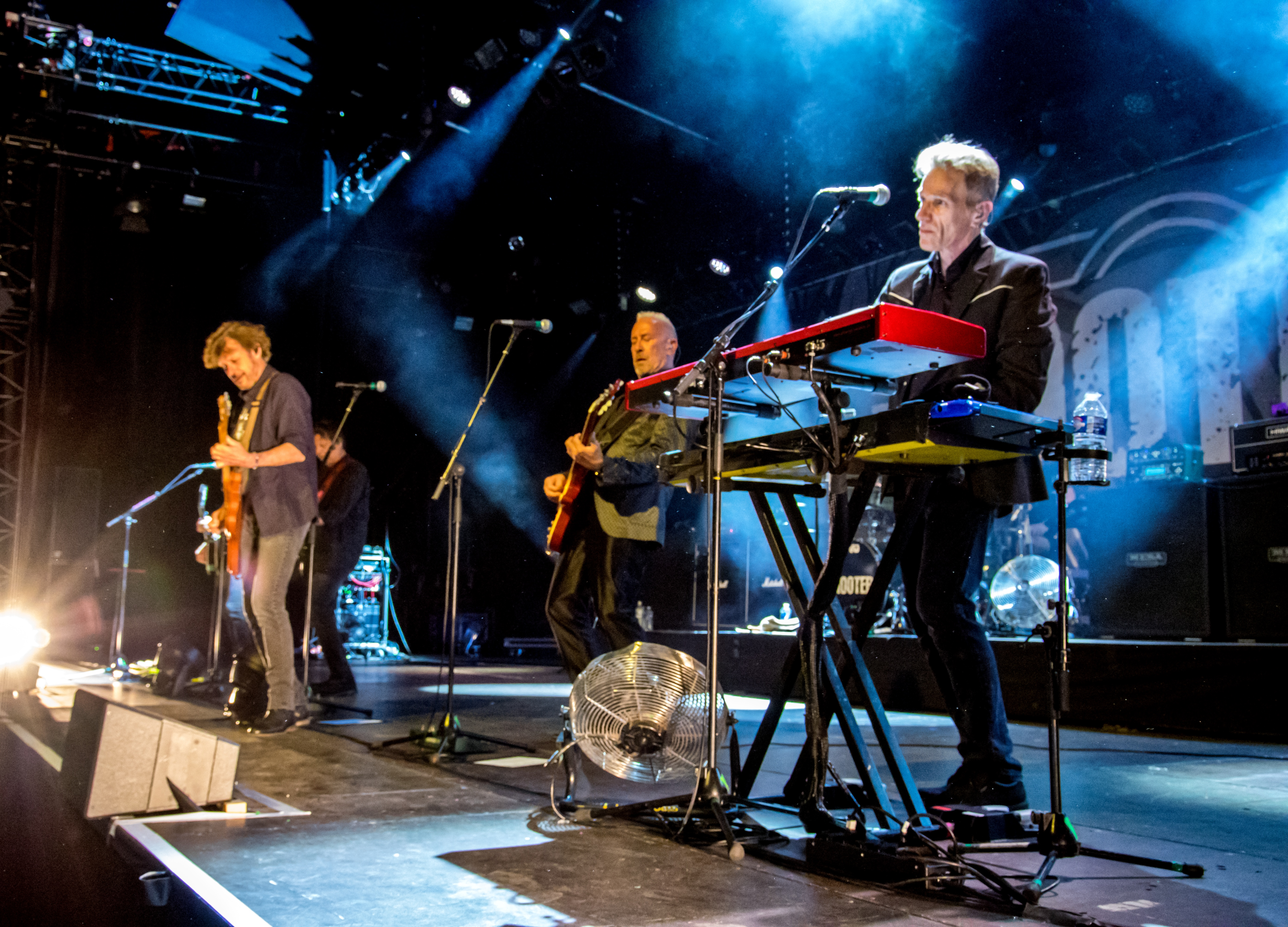 Bilder vom Zelt Musik Festival 2018 in Freiburg im Breisgau Auftritt The Hooters am 26. Juli 2018 im Zirkuszelt